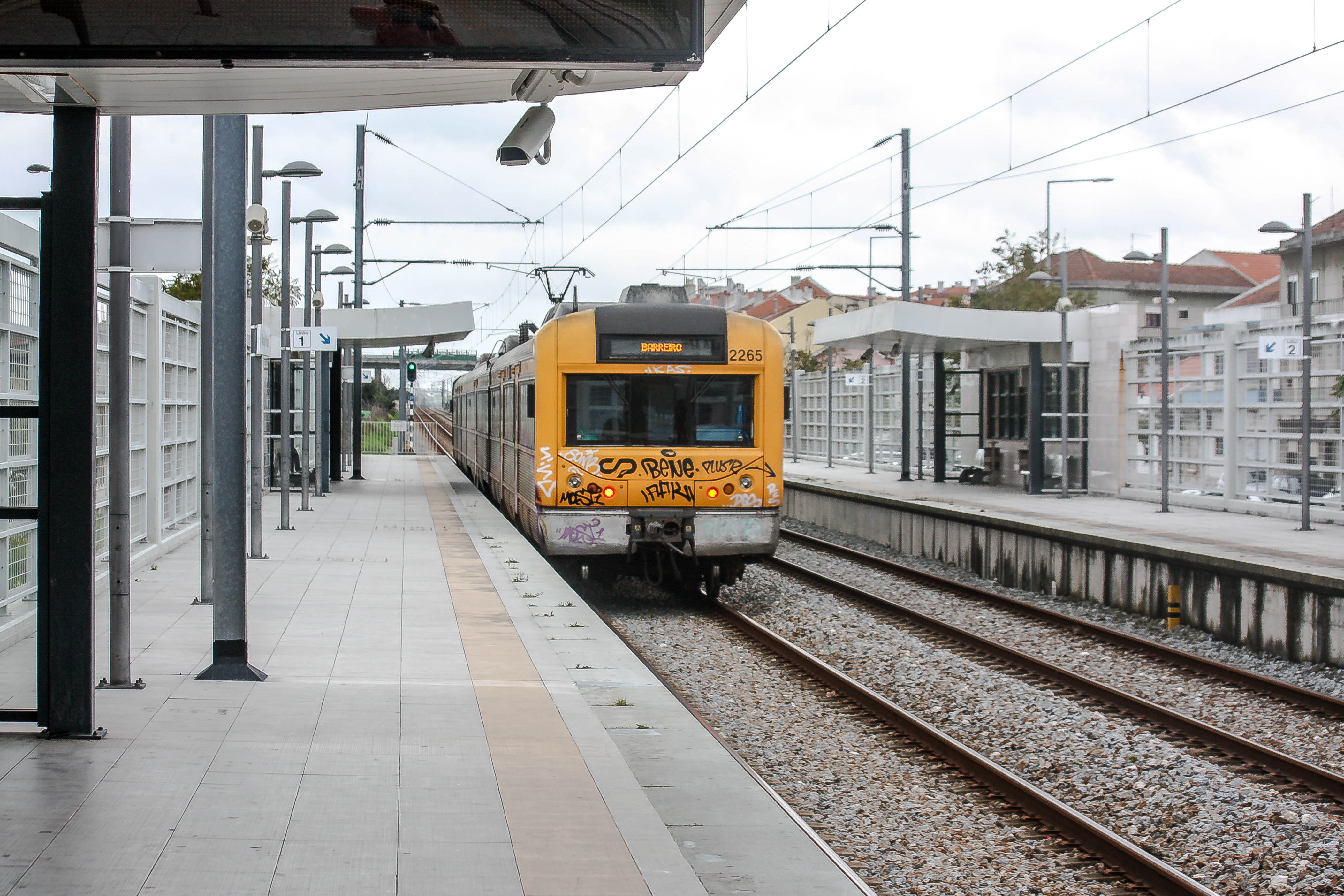 CP 2265 com um suburbano para Praias do Sado-A, à saída do Apeadeiro de Alhos Vedros.